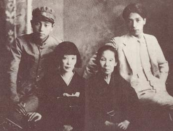 左から原保美、原阿佐緒、原しげ、原千秋、1943年以前（原しげの生前）の撮影。